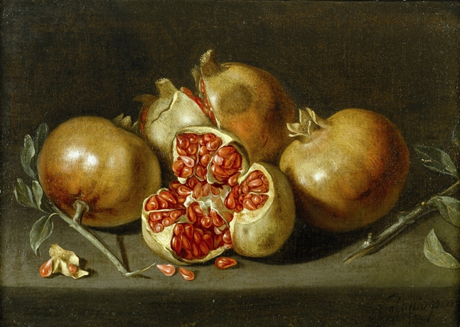 Granadas